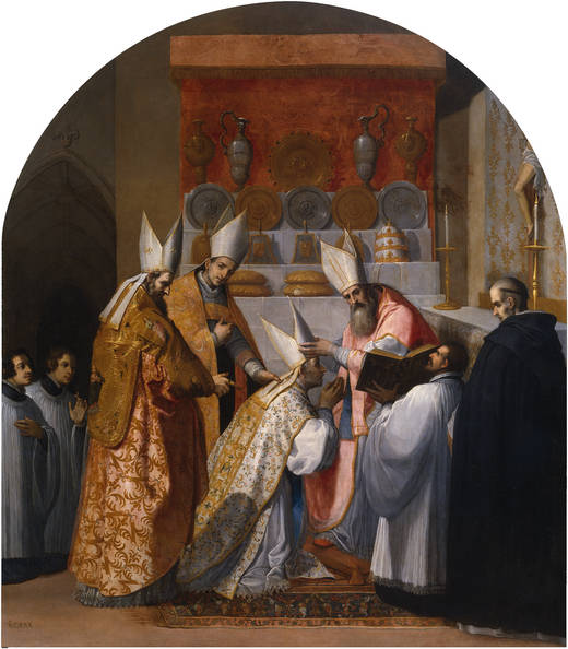 Vicente Carducho. El papa Alejandro III consagra a Antelmo de Chignin como obispo de Belley (1626-1632). Óleo sobre lienzo. Medidas: 336cm x 297cm.